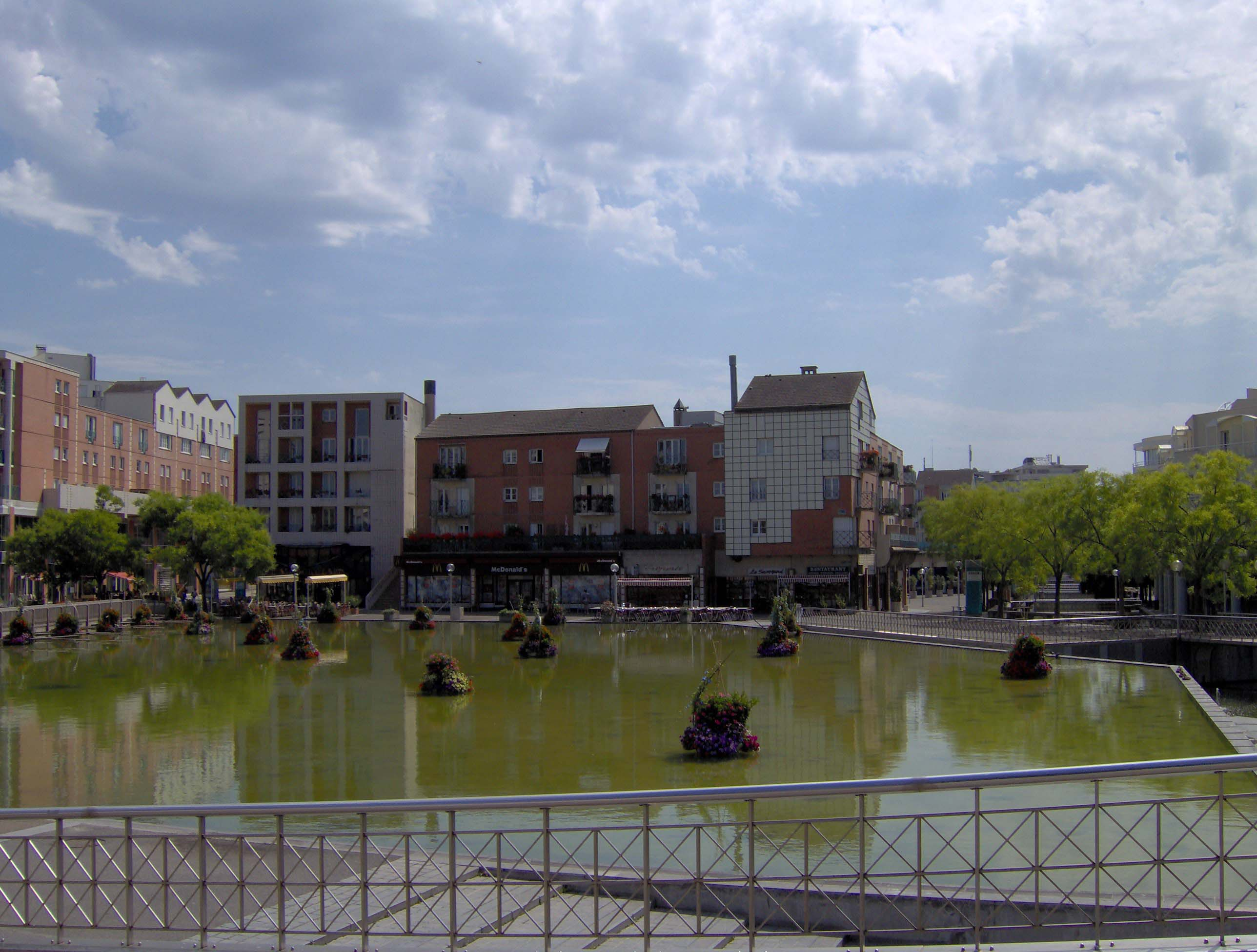 Centre commercial « Espace Saint-Quentin » à Montigny-le-Bretonneux.